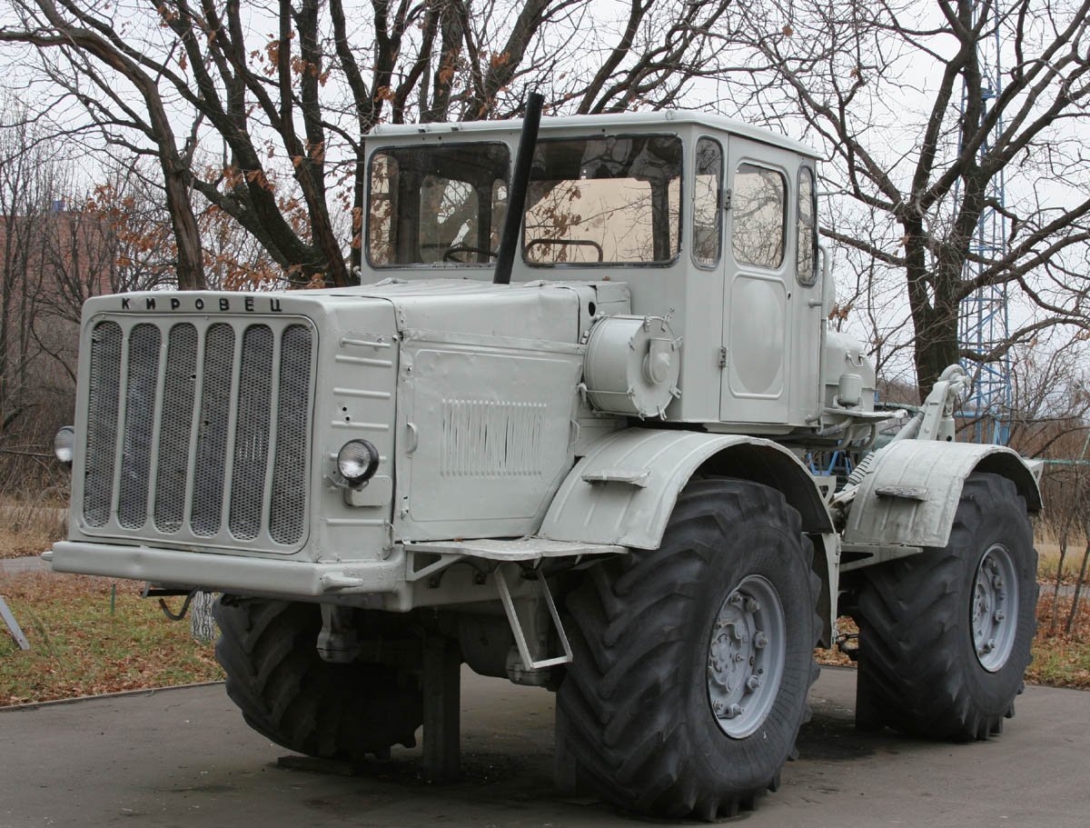 Трактор К-700 в Саратове на Соколовой горе